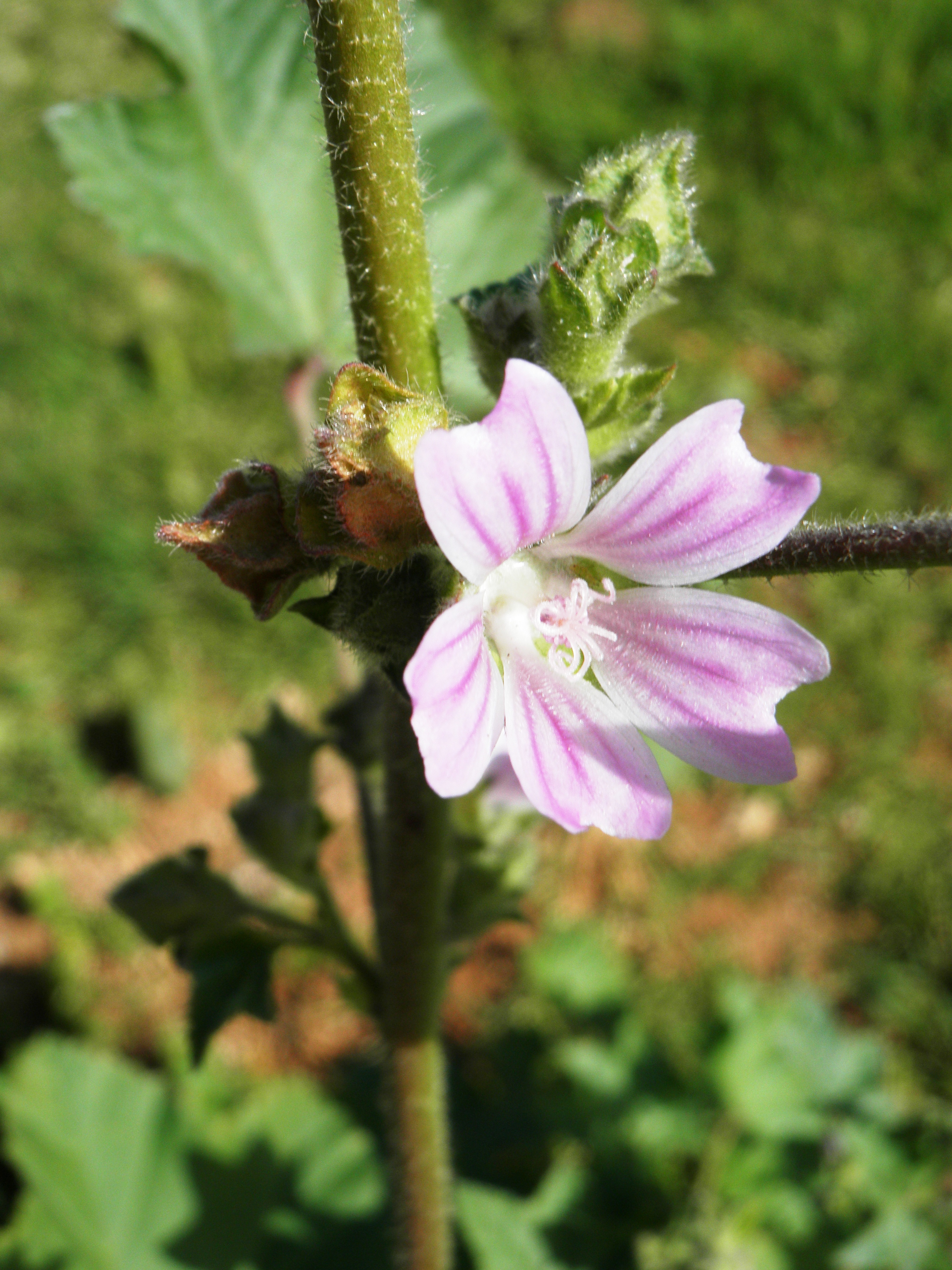 flowers חלמית מצויה